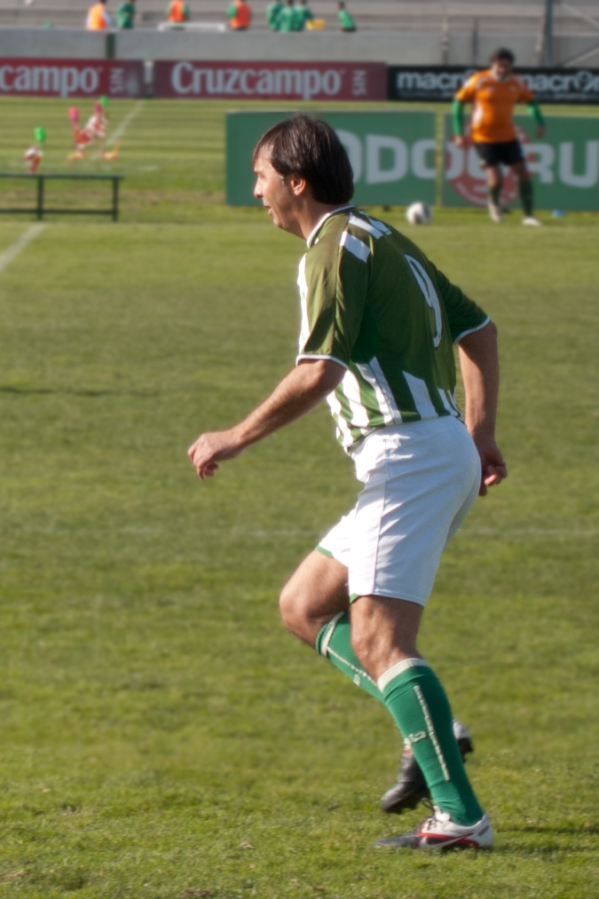 Vlada Stošić. Ciudad deportiva Real Betis 2013.